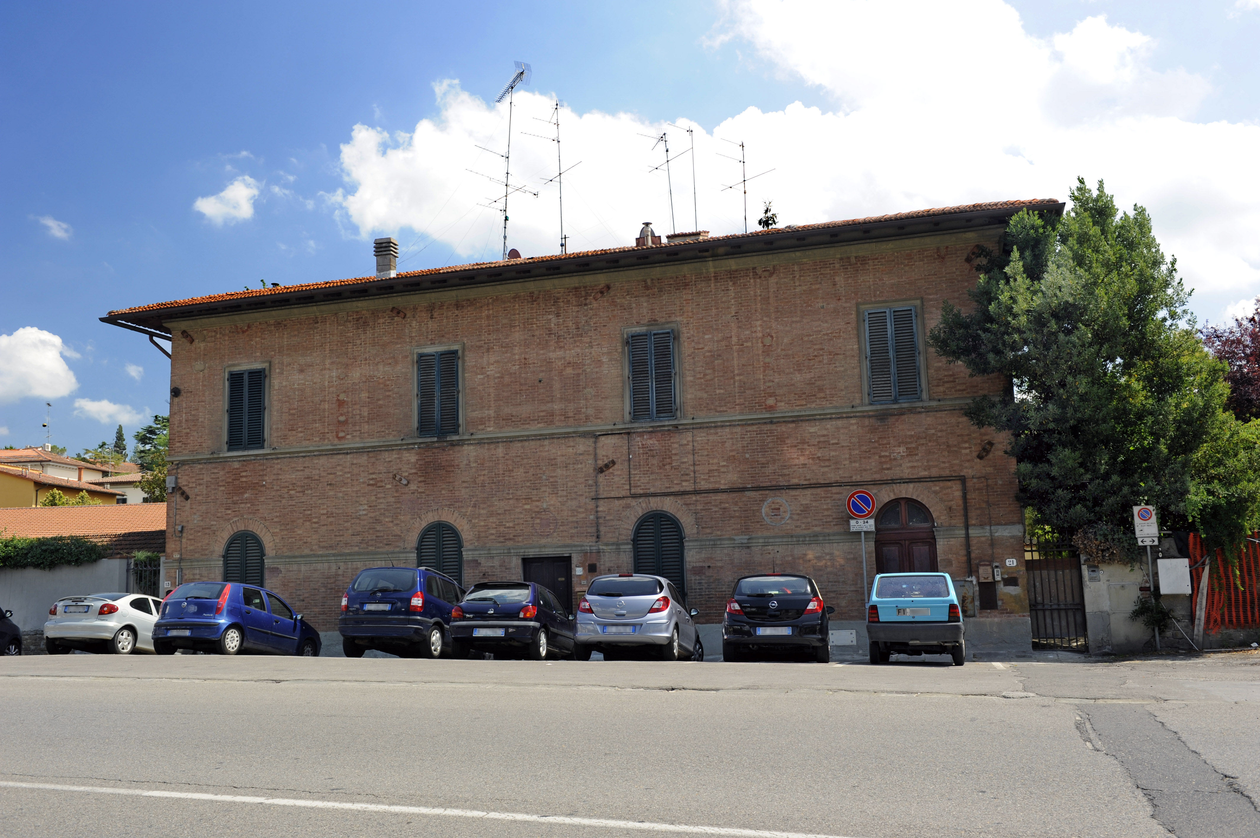 L'edificio che un tempo ospitava la stazione del Gelsomino sulla linea della Tranvia del Chianti